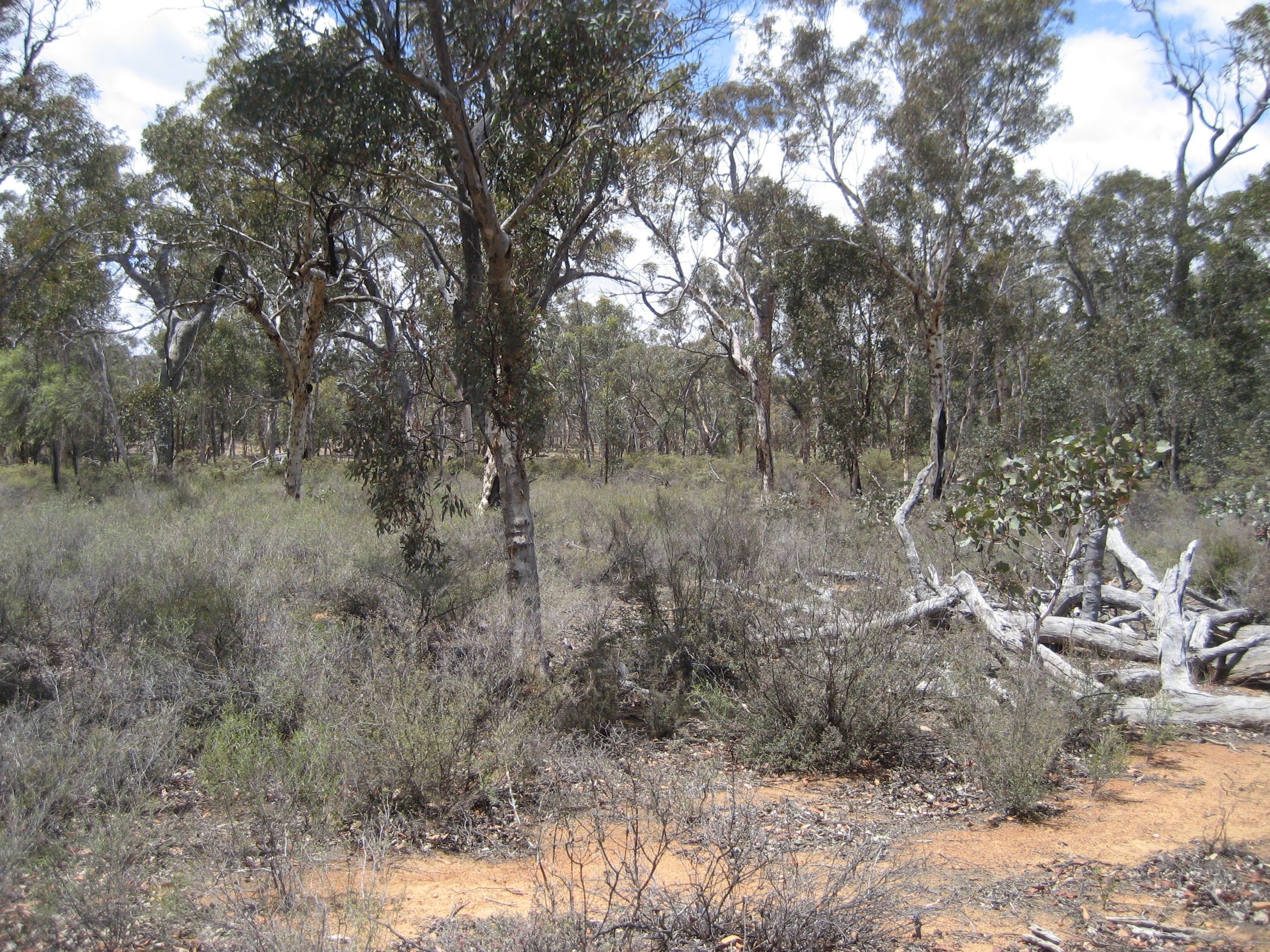 Dryandra Woodland